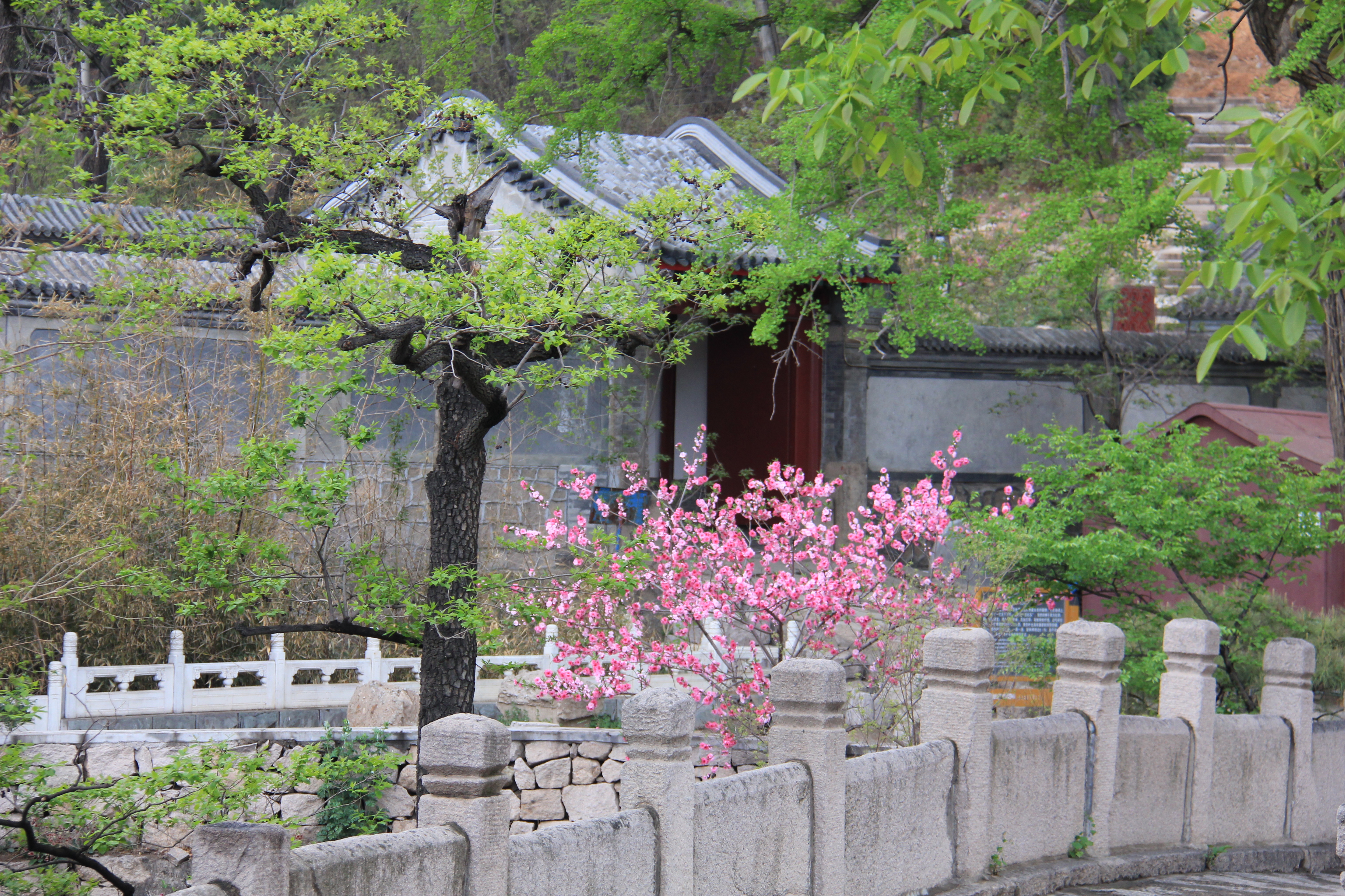 龙泉寺金龙桥